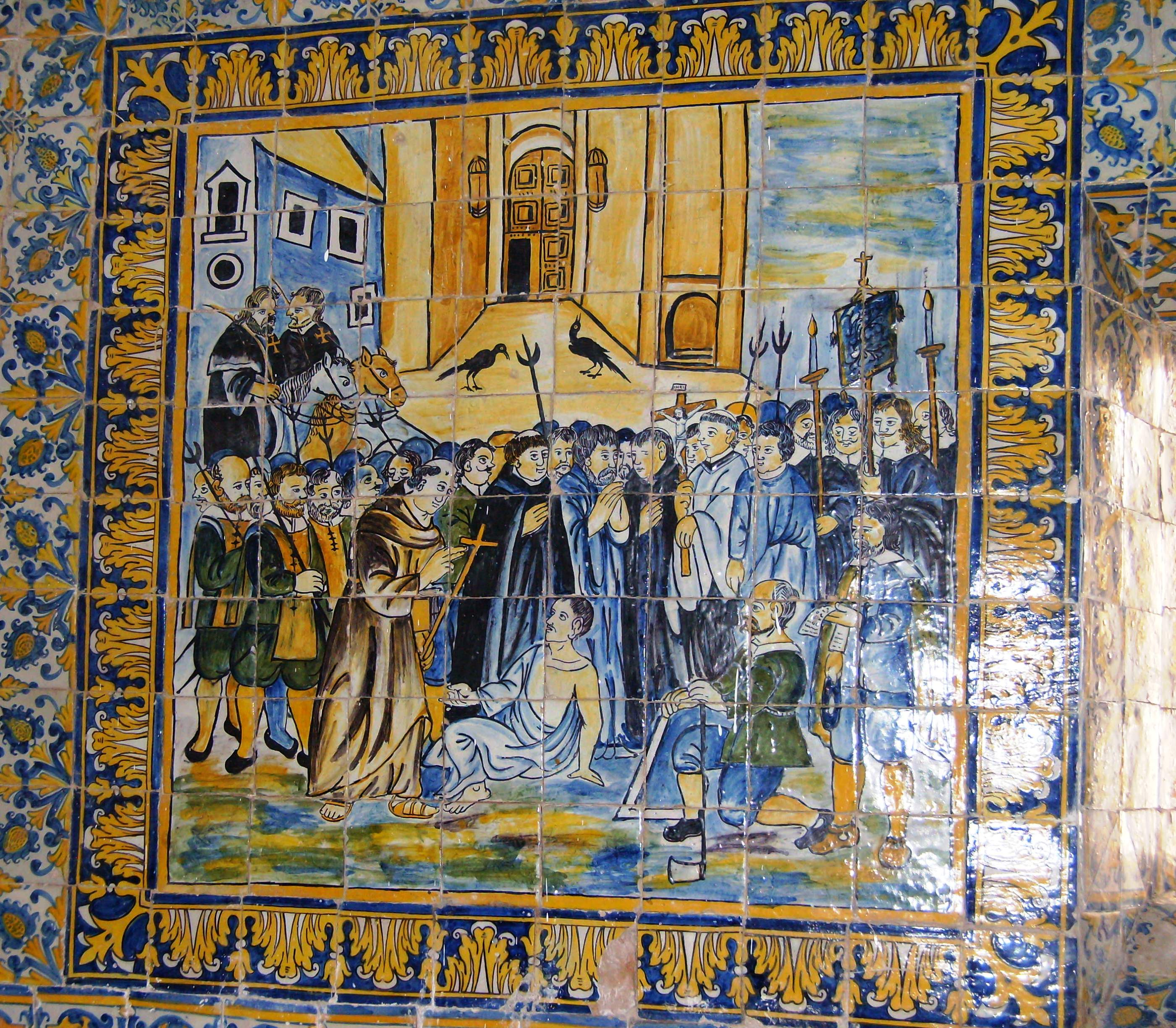 Igreja de Nossa Senhora da Vitória, ilha de Santa Maria, Açores: painel de azulejos (século XVII) na capela de Santo António representando aquele santo a ressuscitar um morto diante da Sé de Lisboa.